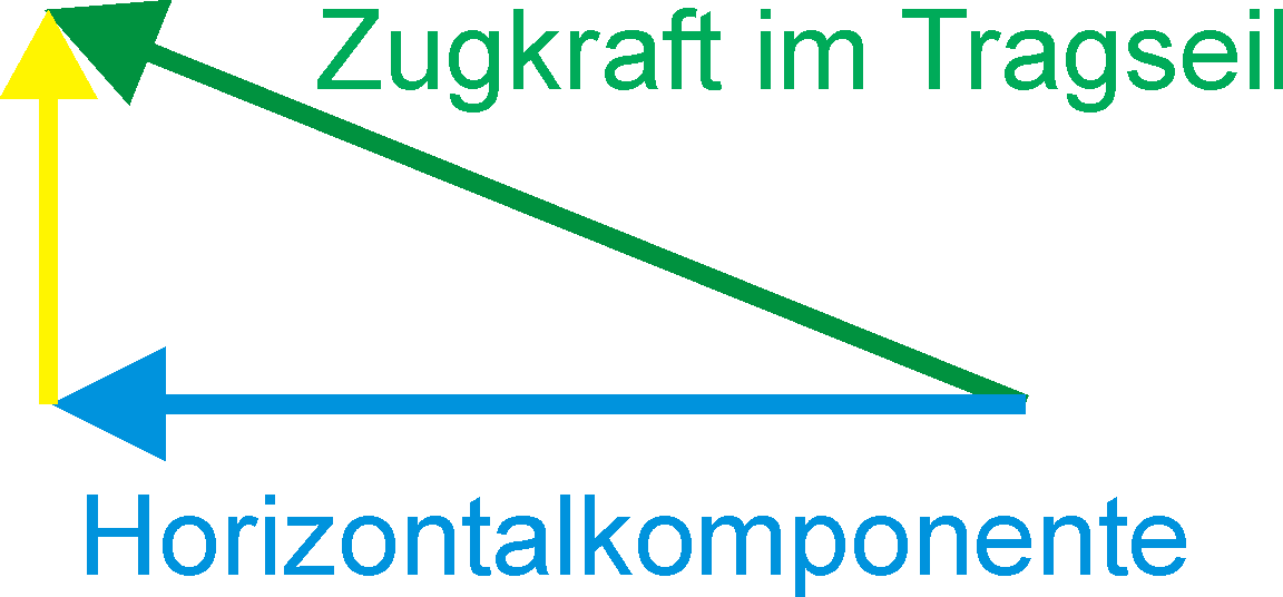 Zerlegung einer Zugkraft in eine horizontale und eine vertikale Komponente